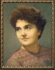 Фрагмент обложки книги Гребенника Г.П. "Портрет интеллигента в одесском интерьере" Одесса, Изд-во "Феникс", 2010